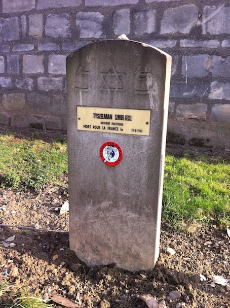 tombe de Samuel Tyszelman Cimetière parisien d'Ivry